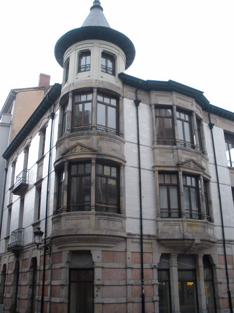 Paisaje urbano de Sama de Langreo (Asturias)